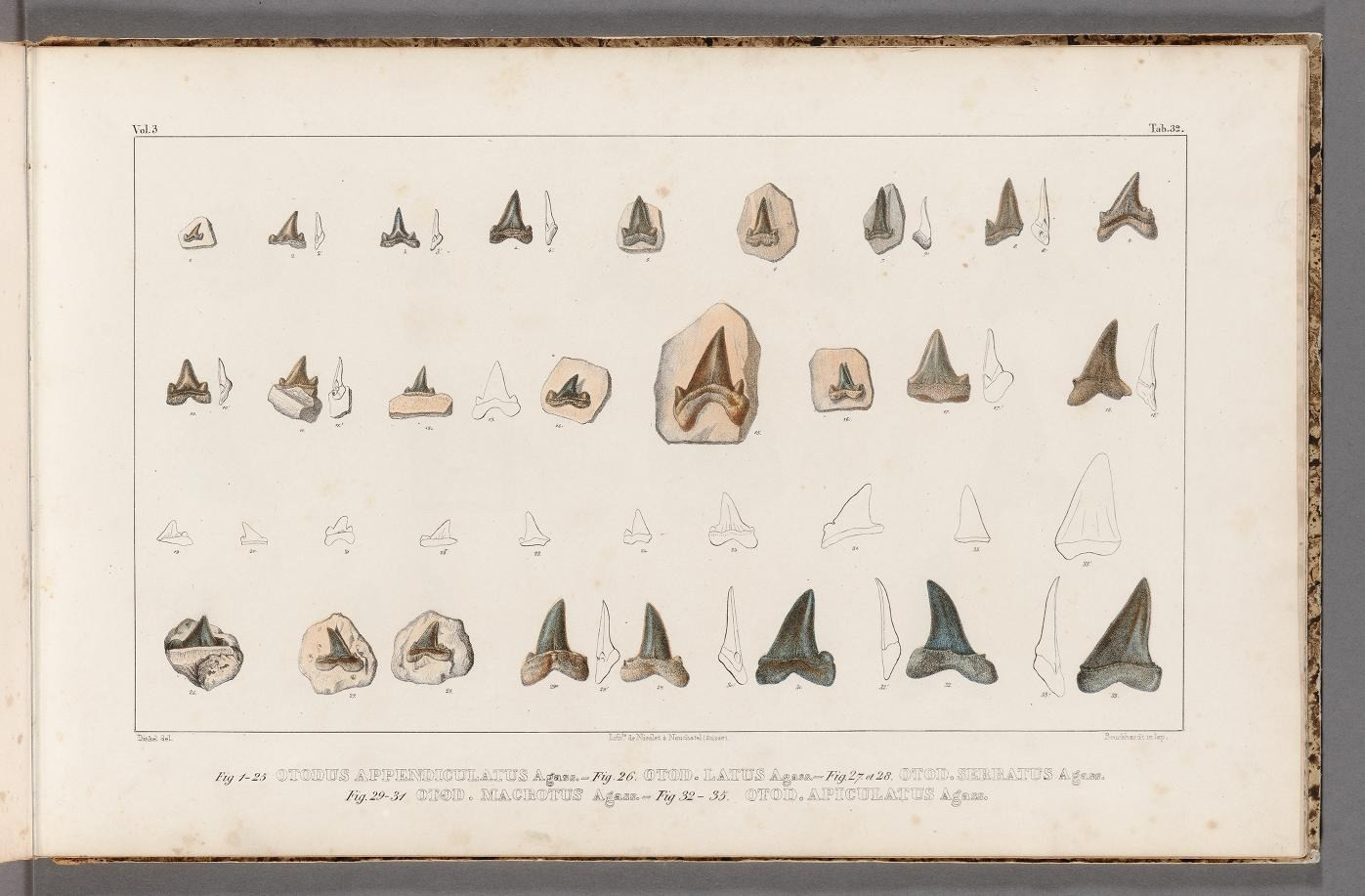 .^ ^ 1-. \, « - Vol. 3 To"b.32 ? . \i